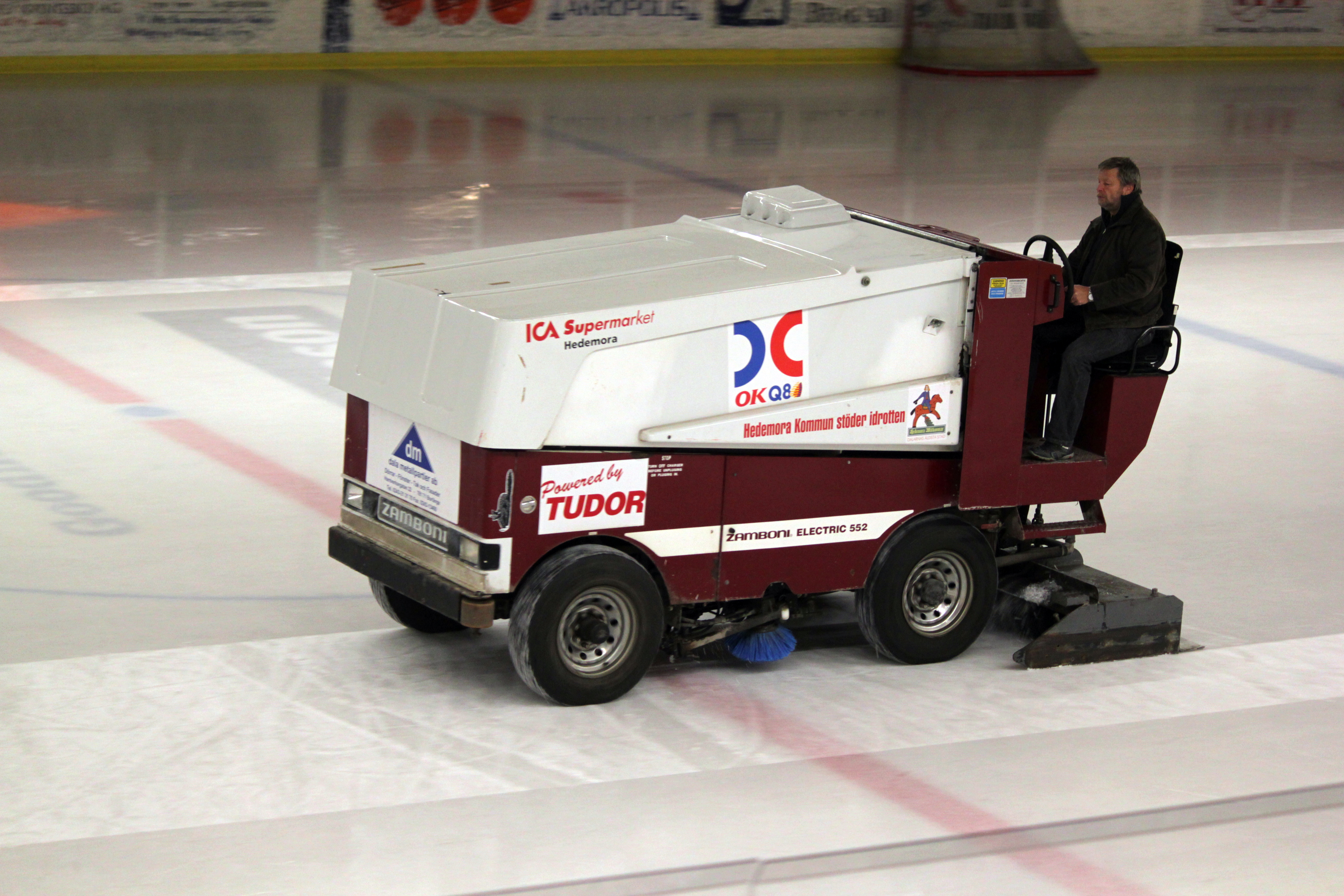 Uppvisningsmatch mellan Leksands IF och Bofors IK, Bolidenhallen, Hedemora